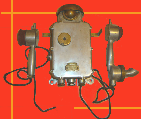 Deseño teléfono Fenya